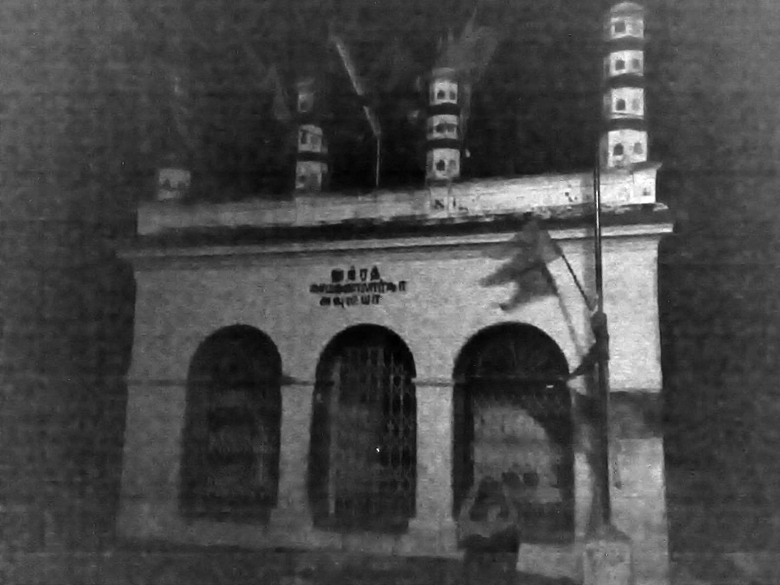 Unknown language: Hazrat Saalaar Sha Shaheed Dargah